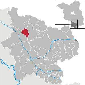 Kremitzaue in Brandenburg (Country) - District Elbe-Elster